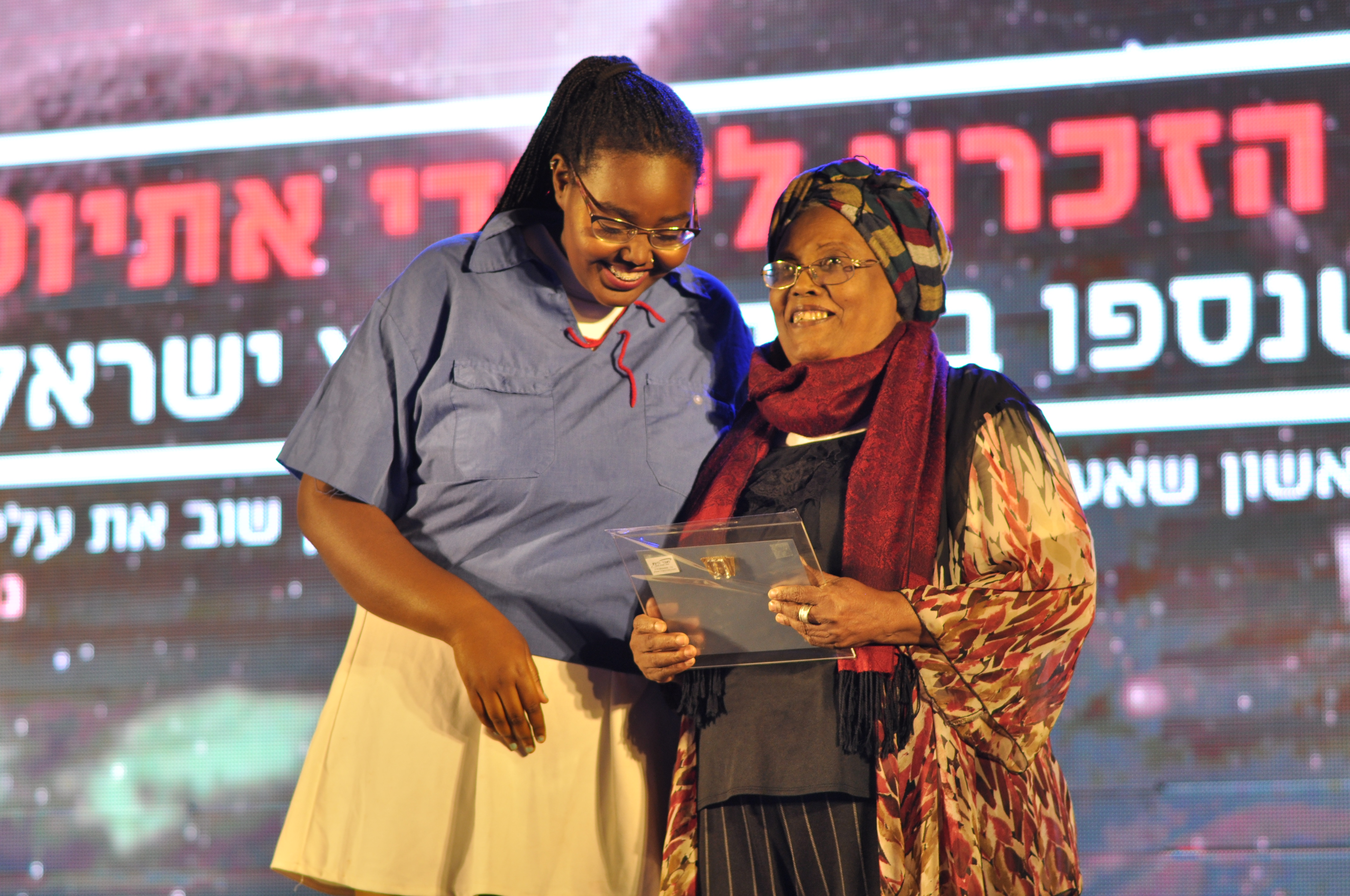 חירות טקלה, אסירת ציון - מלווה בחניכה מהנוער העובד והלומד בטקס זיכרון ליהודי אתיופיה שנספו בדרכם לארץ ישראל, נתניה 2017